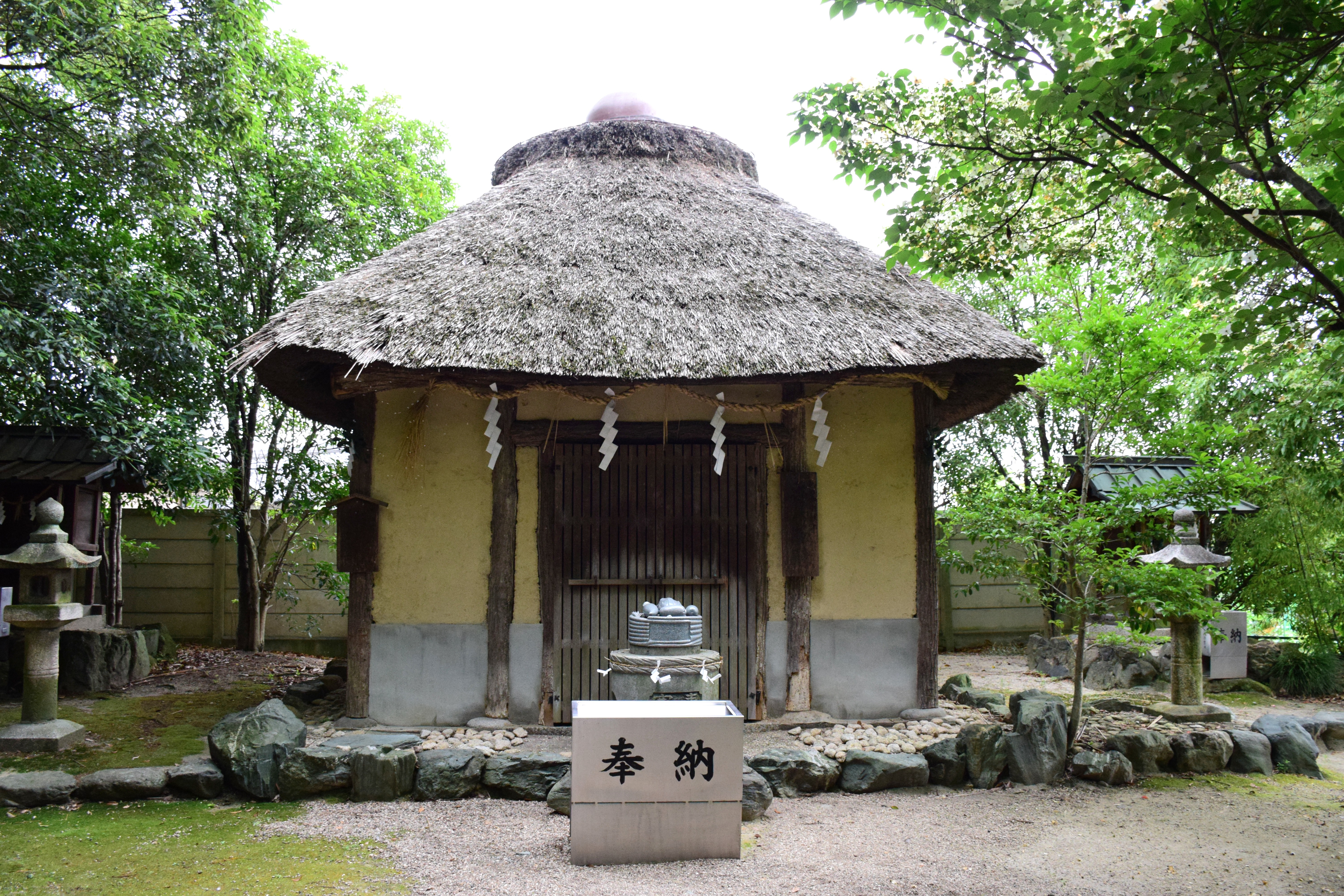 萱津神社香の物殿